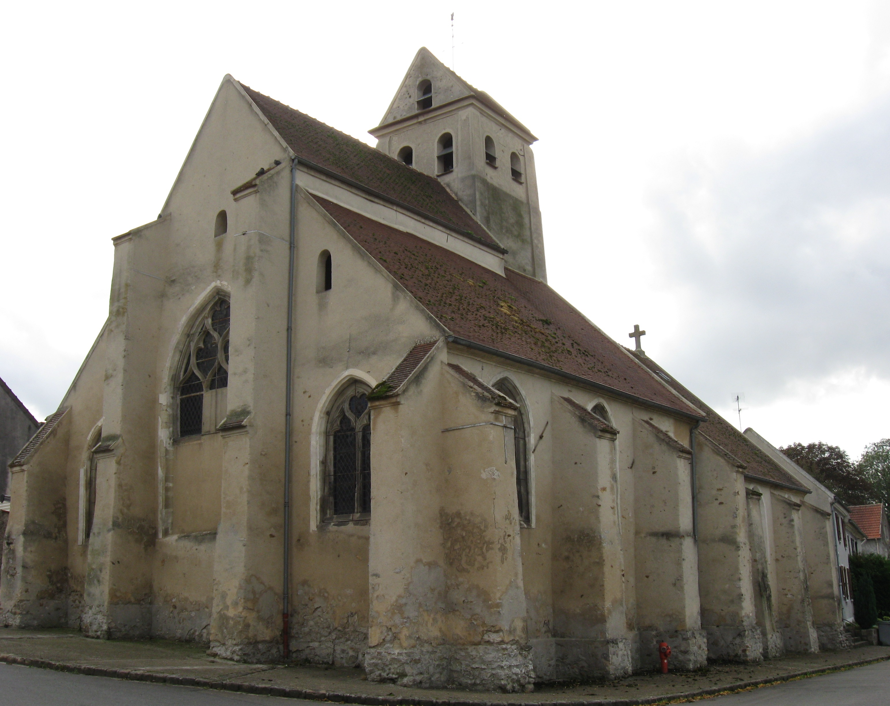 Église de l'Assomption-de-la-Vierge de Vinantes. (Seine-et-Marne, région Île-de-France).